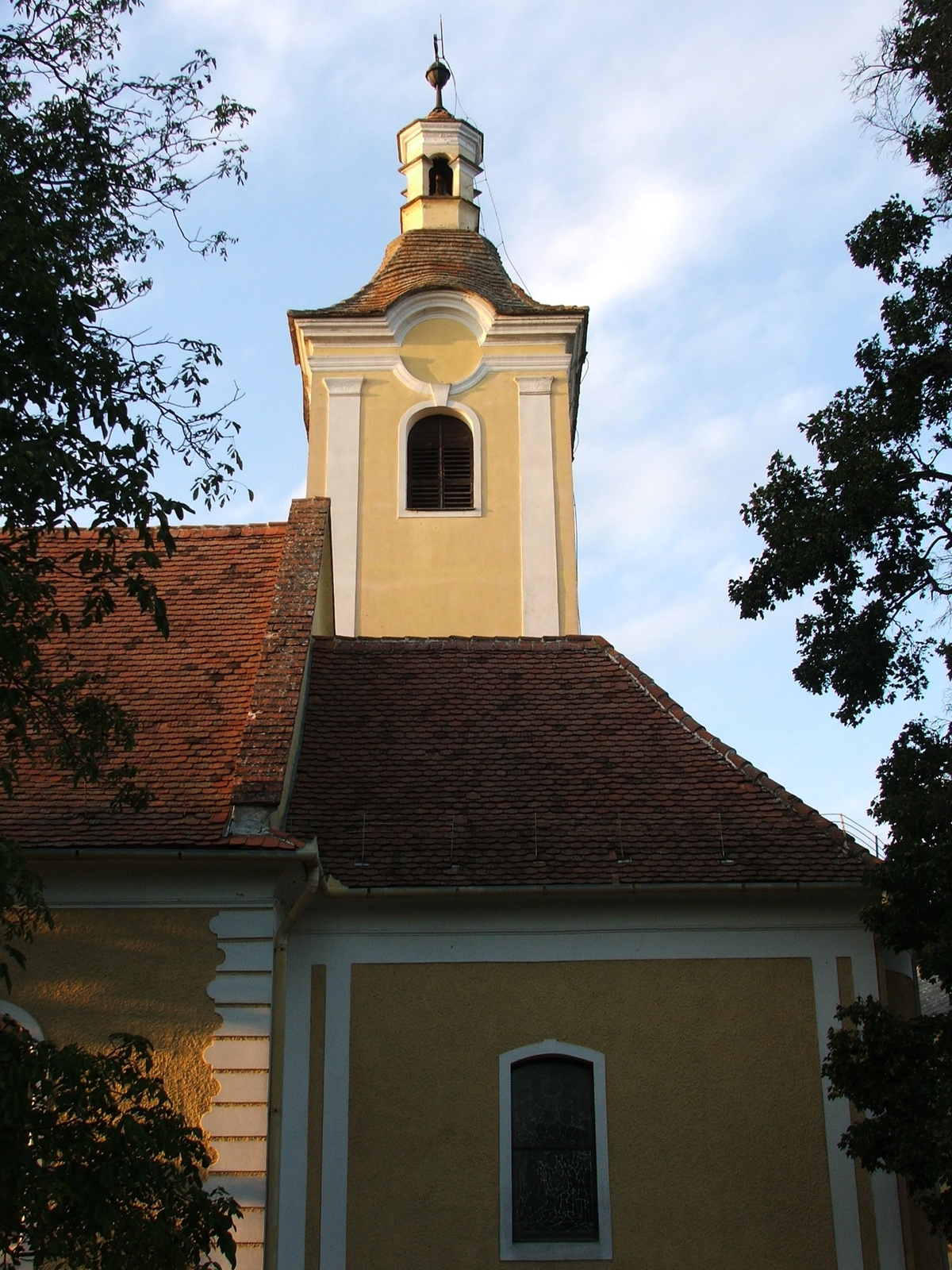 R. k. templom (Szepetnek, Petőfi Sándor u. 63.) This is a photo of a monument in Hungary, Identifier: 11011